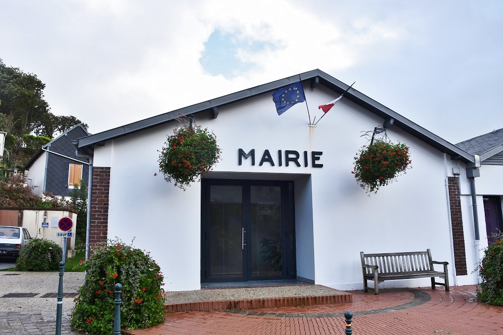 Mairie de Fontenay (76).